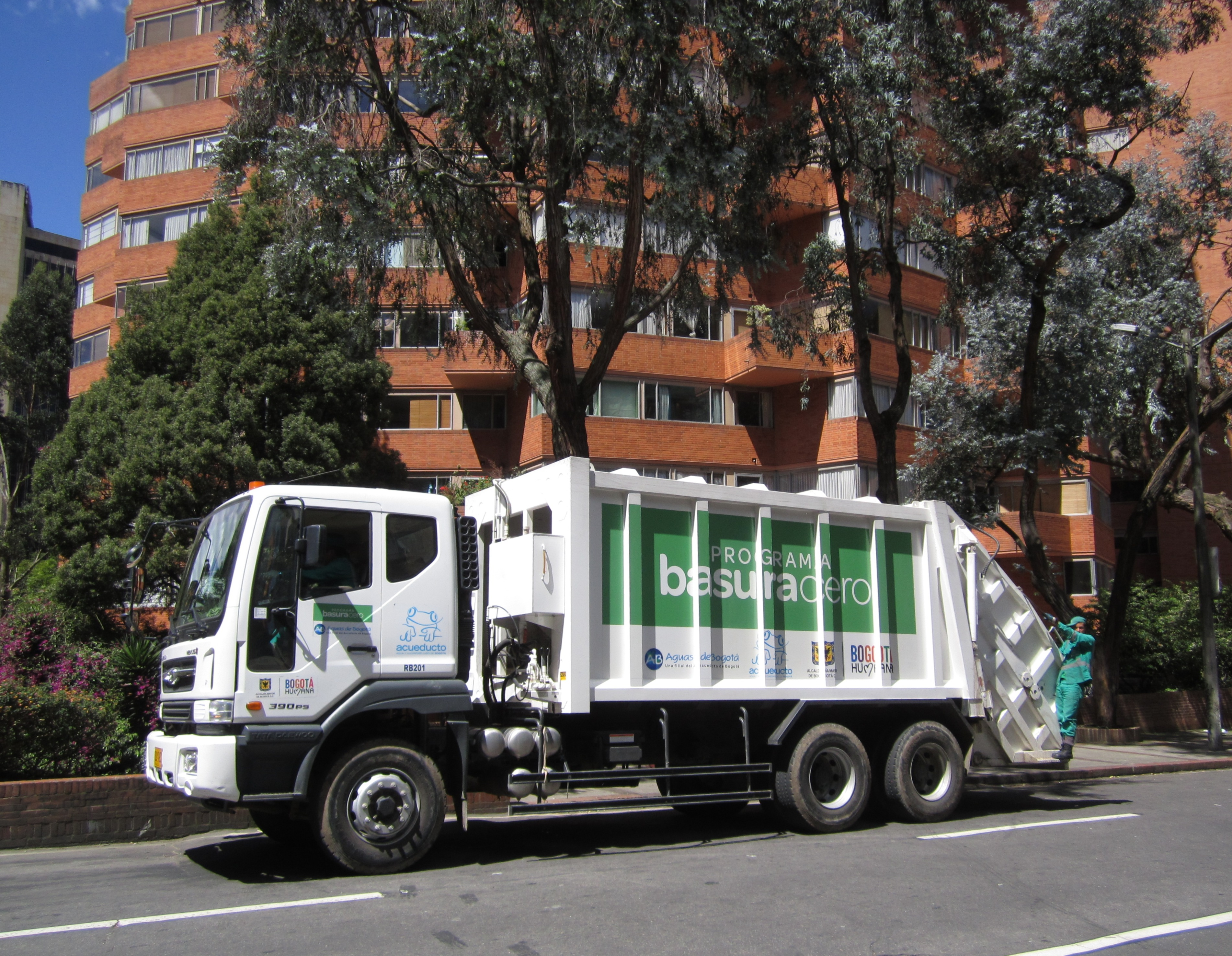 Bogotá